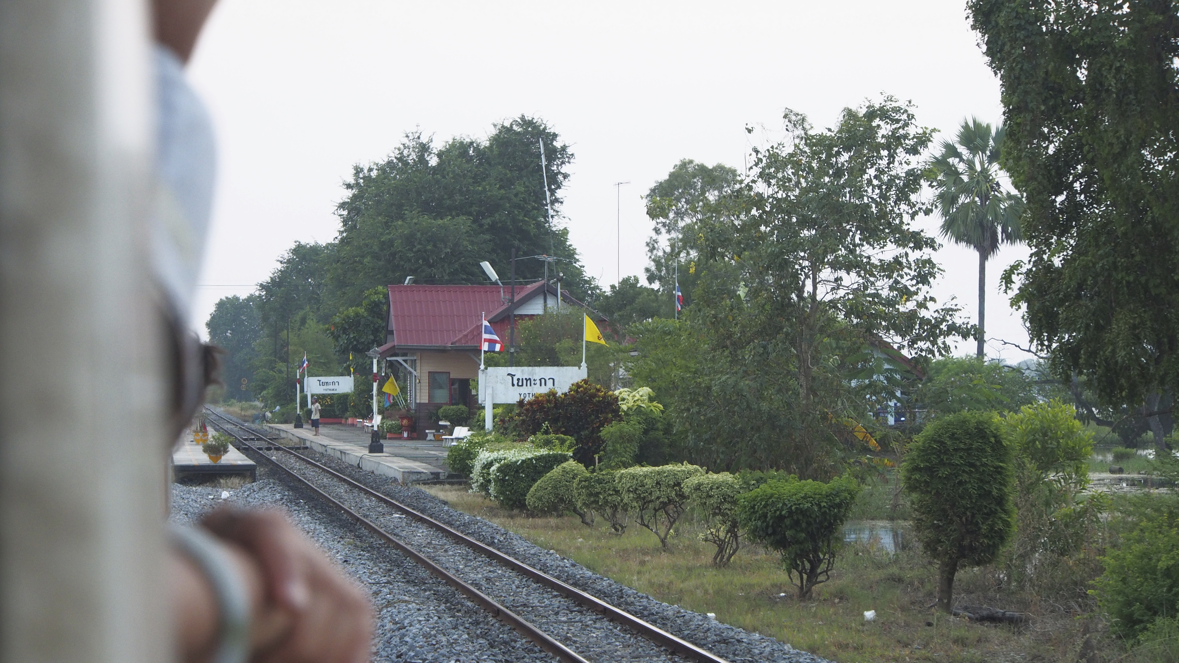 Aranyaprathet to Bangkok